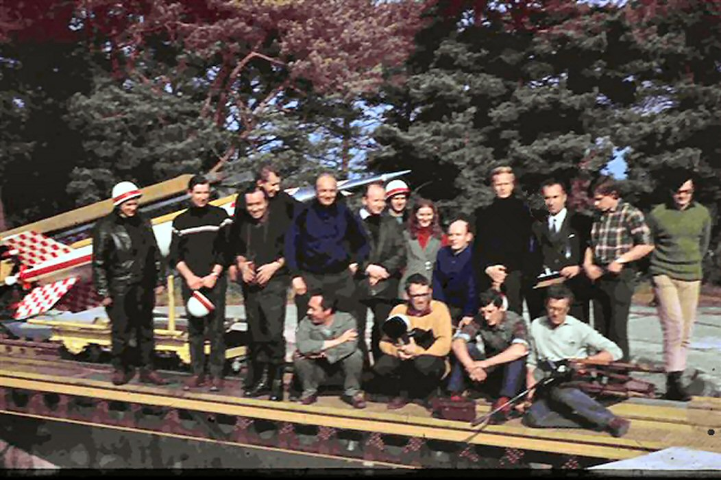 Mierzeja Łebska, październik 1970. Zespół Instytutu Lotnictwa i Państwowego Instytutu Hydrologiczno - Meteorologicznego przed odpaleniem ostatniej rakiety Meteor 2K. (M2-K-10). Pułap rakiety ponad 100km [odpalony obłok dipoli stacja radiolokacyjna inż, J.Walczewskiego przechwyciła na wysokości 92,5km] Od lewej przed rakietą stoją: N.N., Andrzej Ksyk (Kraków), Jerzy Haraźny, dr Czesław Skoczylas, Adam Obidziński, Witold Błaszczyk, Tadeusz Andrzejewski, Elżbieta Bakoń, Krzysztof Nowak, Grzegorz Paw­lak, Józef Pogoda, dwóch reporterów z radia Koszalin i Wiktor Kobyliński, siedzi NN, Jacek Walczewski (z kamerą), NN, i Franciszek Starorypiński (Kraków).